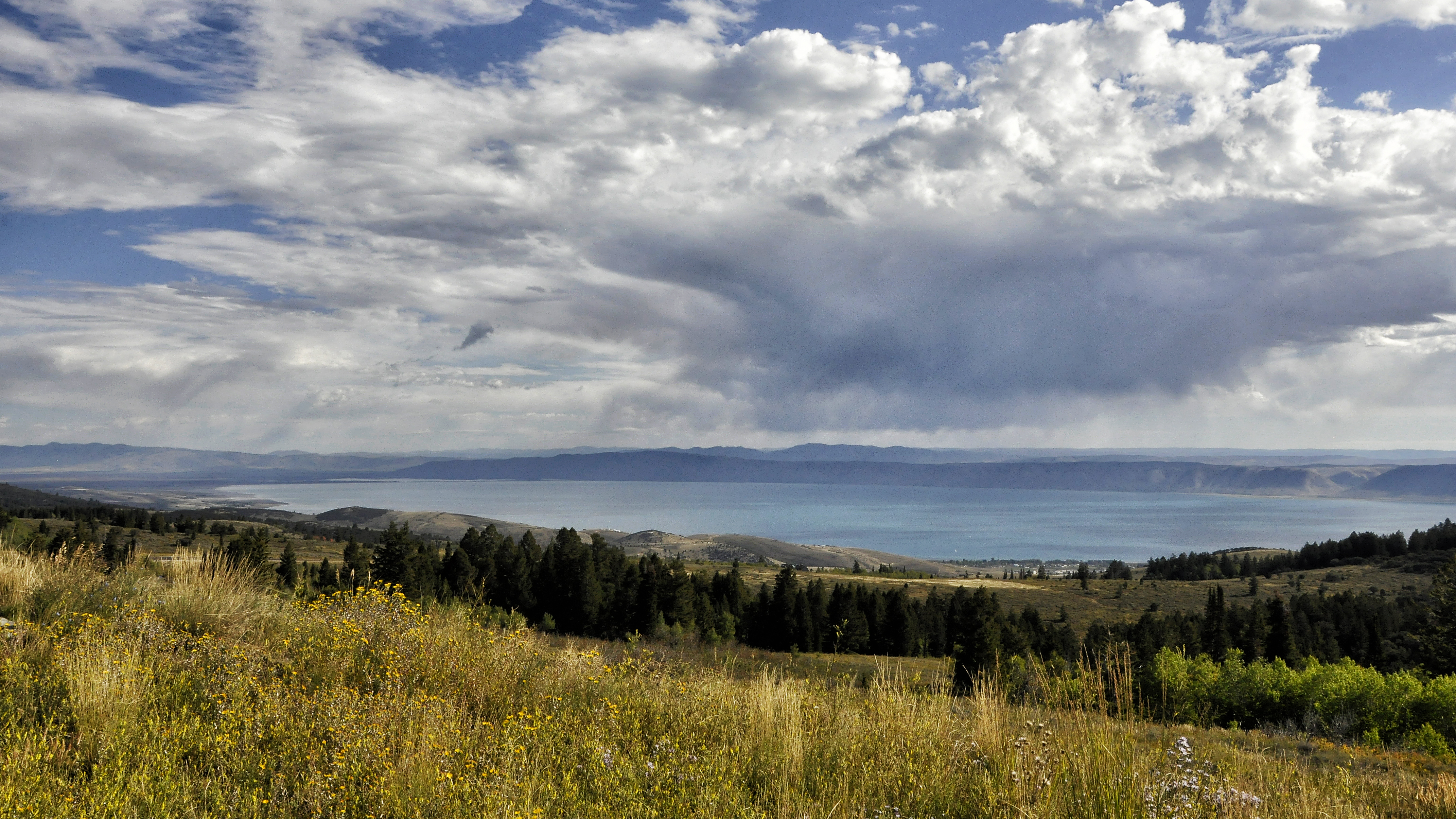 Bear Lake en Garden City, Utah, USA